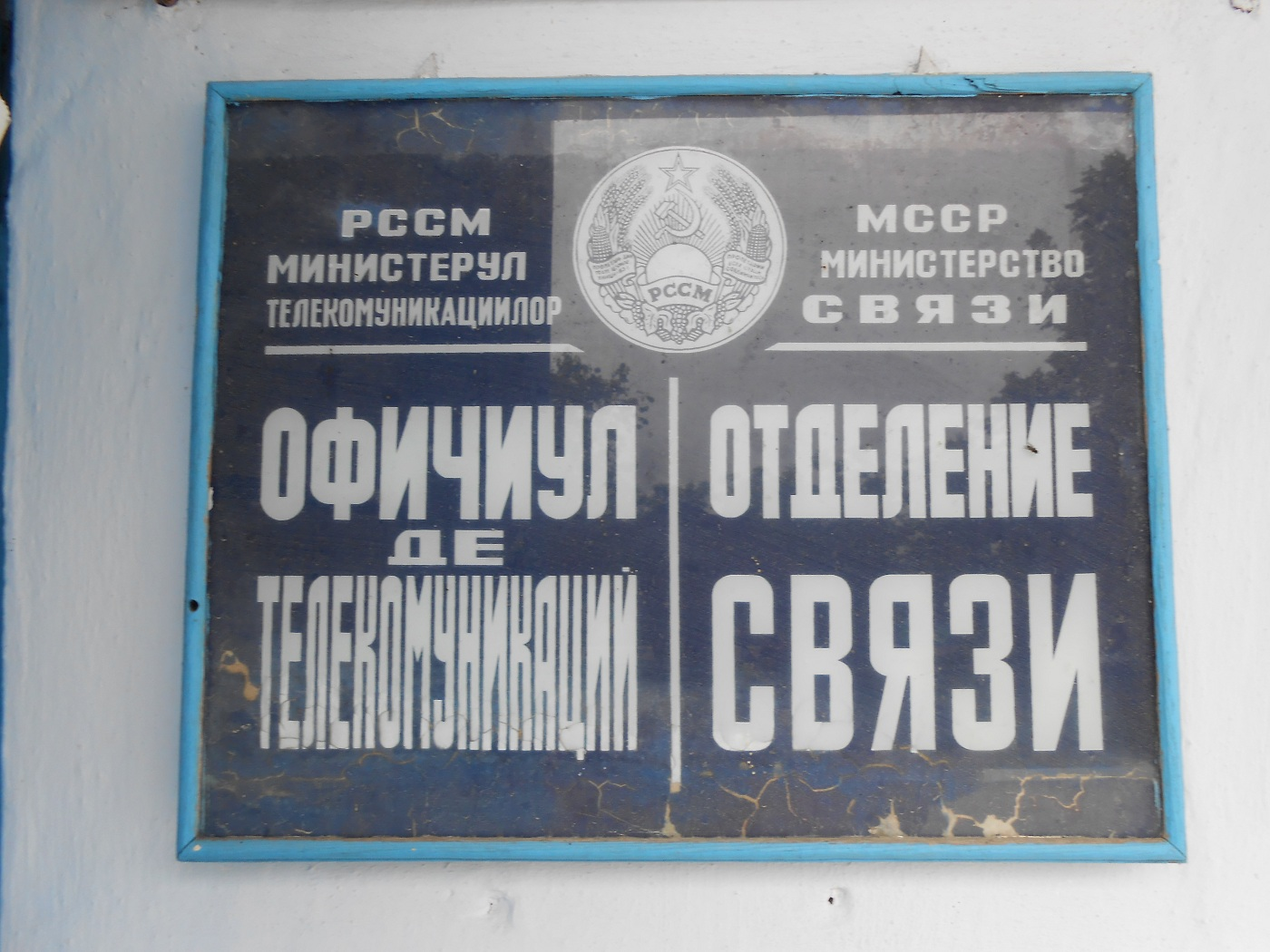 Табличка на одном отделении связи в Приднестровье. Ещё сохранилась советская вывеска! Слева: на молдавском языке. Справа: на русском языке.